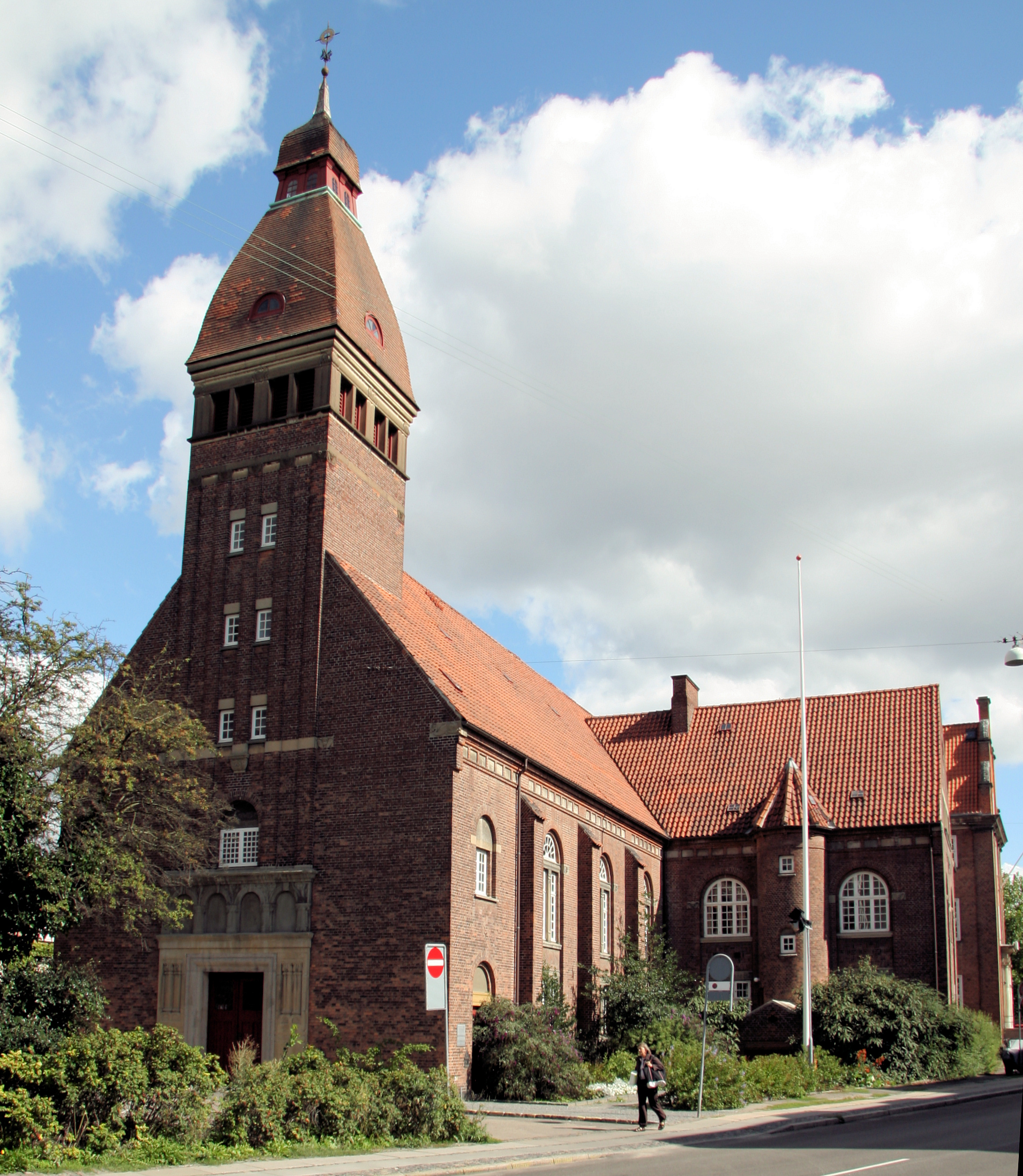 Solbjerg Kirke in Copenhagen, Denmark. Exterior.